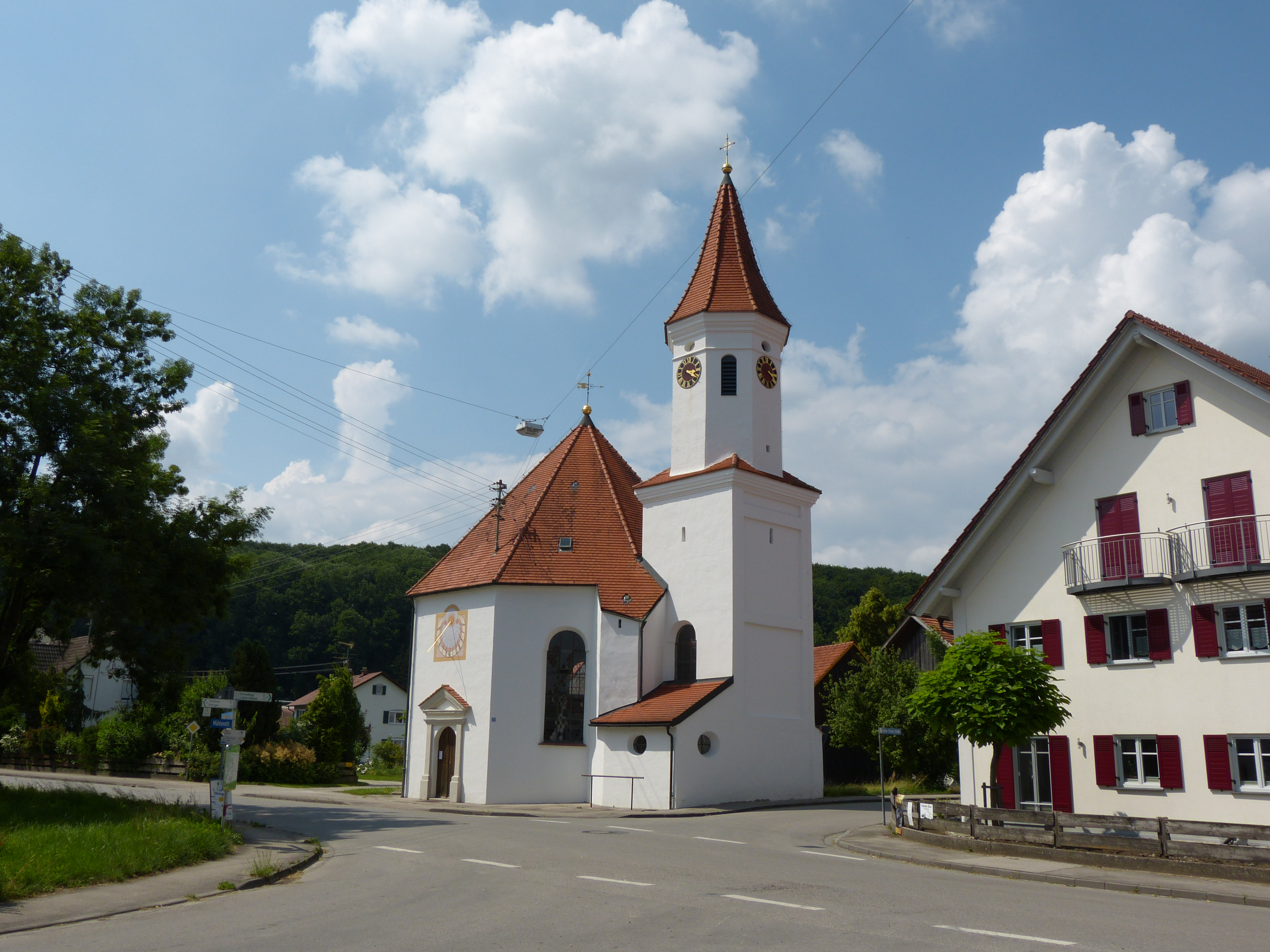 St. Anna, Siebnach bei Ettringen, Landkreis Unterallgäu, Bayern, Deutschland